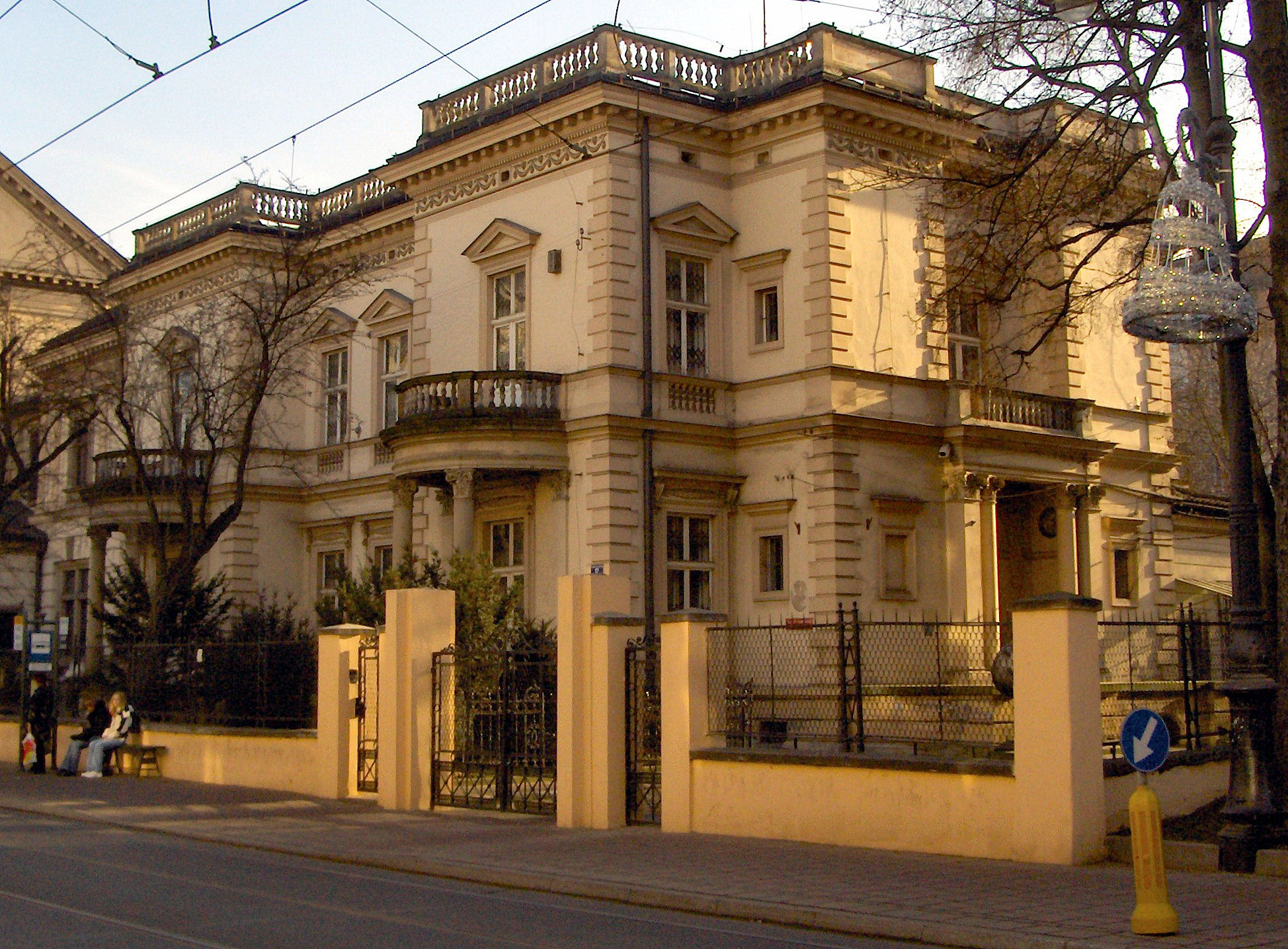 Pałacyk Emeryka Hutten-Czapskiego przy ulicy Józefa Piłsudskiego 12 w Krakowie. Mieści się tutaj Muzeum im. Emeryka Hutten-Czapskiego będące oddziałem Muzeum Narodowego w Krakowie.